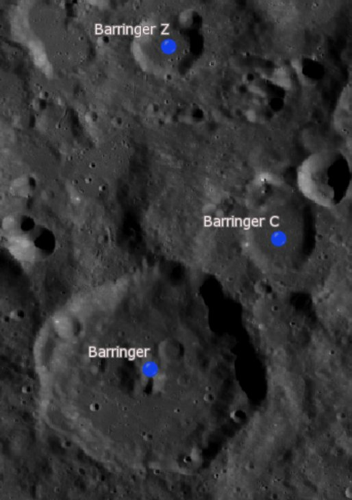 Cráter lunar Barringer. Cráteres satélite. (Imágenes LRO)